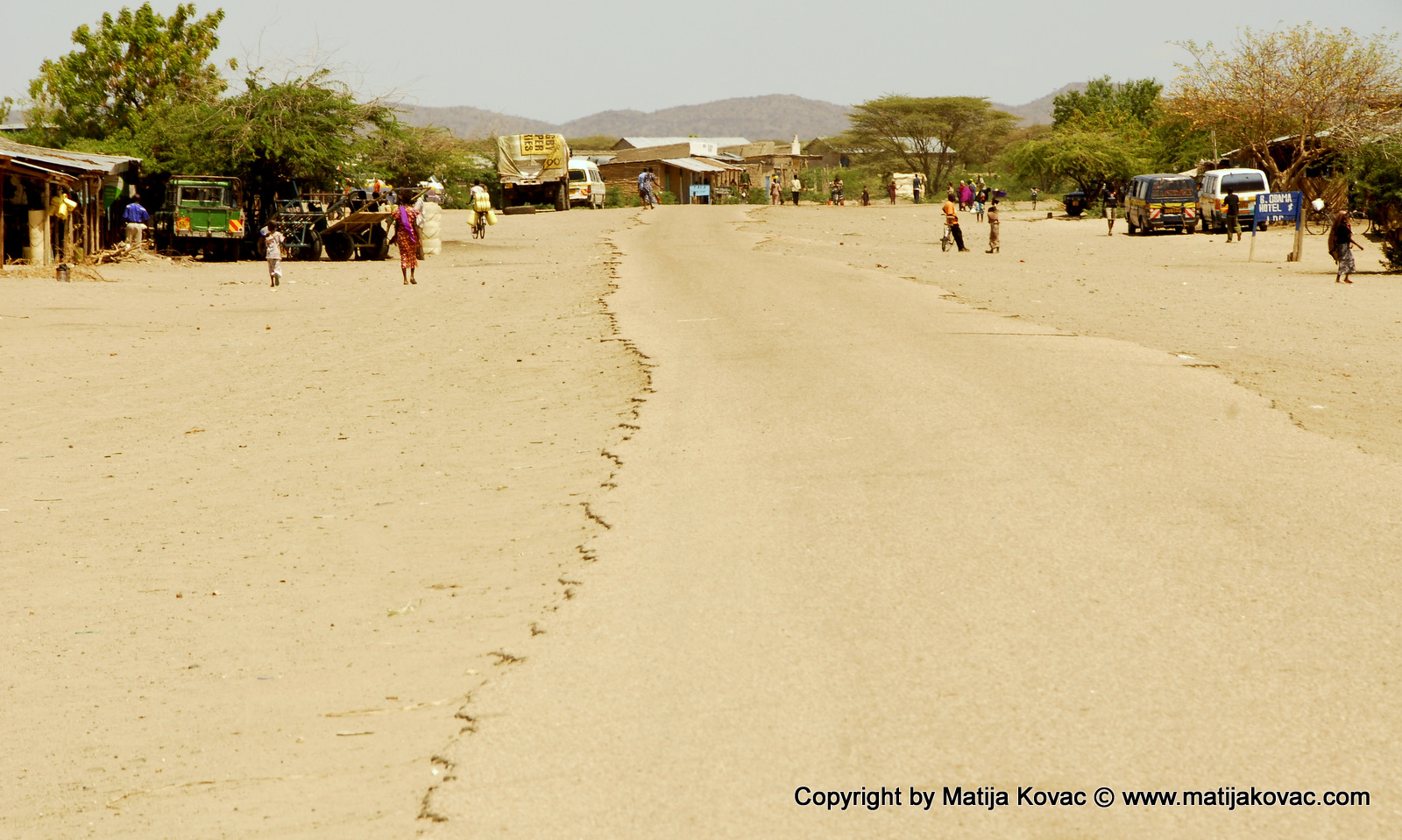 Kalokol town main street